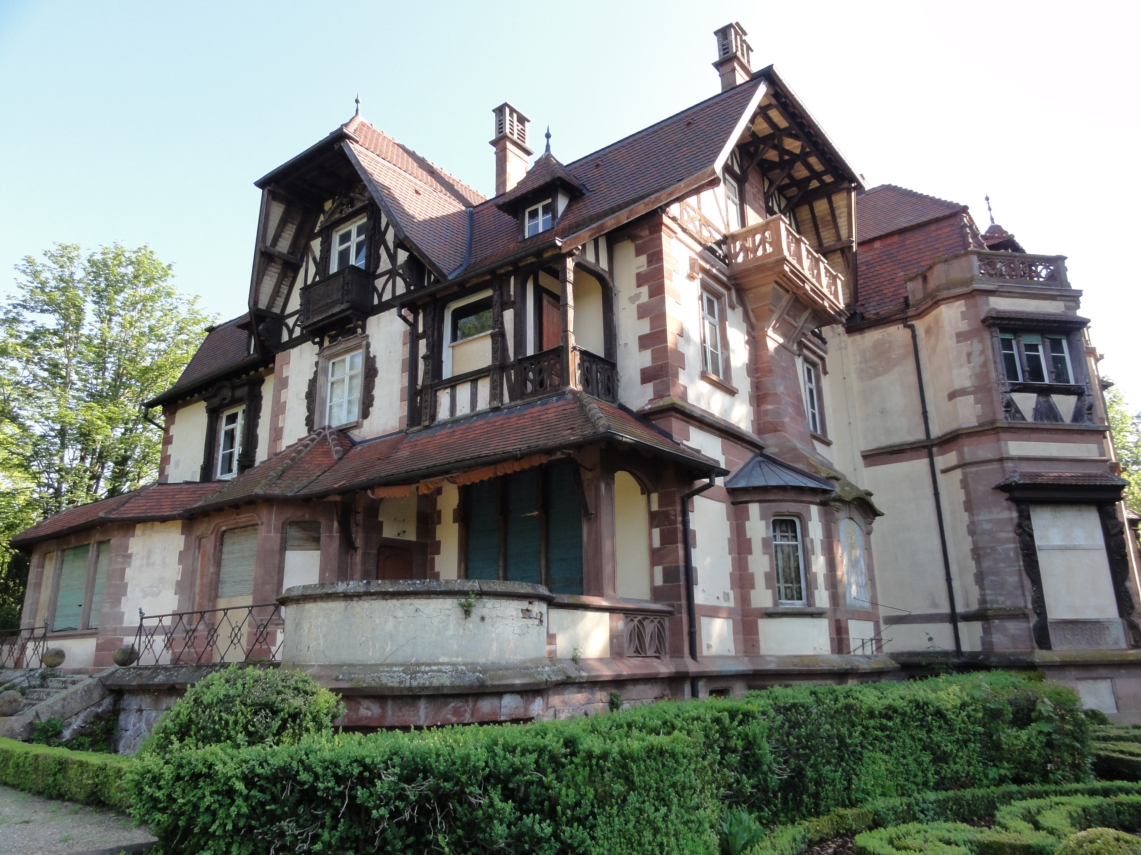 Alsace, Bas-Rhin, Obernai et Boersch, Domaine de la Leonardsau (1899-1921) (PA00084847, IA00024016).